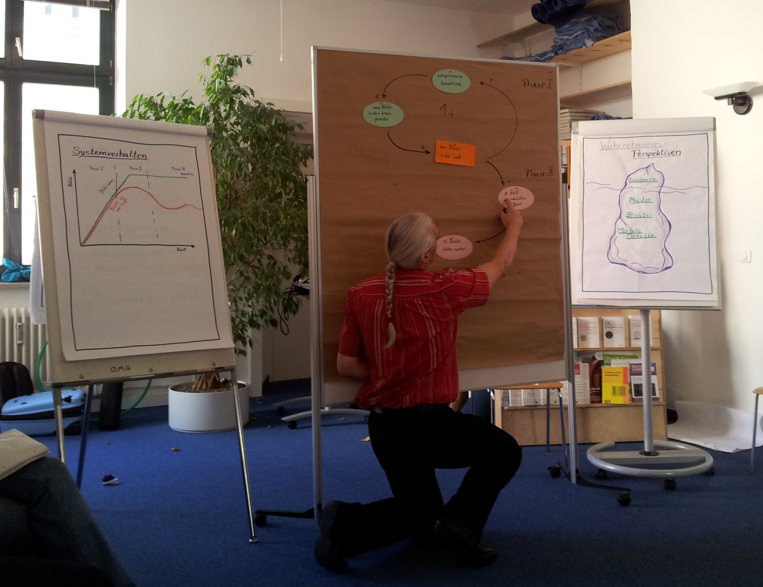 Interaktiver Kartenvortrag zum Thema Systemtheorie